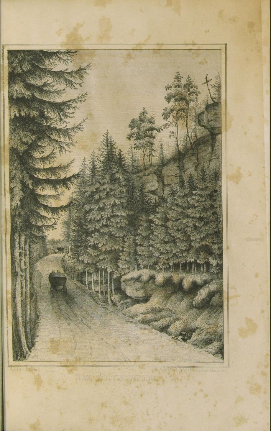 Johann Traugott Lindner: Wanderungen durch die interessantesten Gegenden des Sächsischen Obererzgebirges. Ein Beitrag zur specielleren Kenntniß desselben, seines Volkslebens, der Gewerbsarten, Sitten- und Gebräuche. Mit 12 Lithographien, Verlag Rudolph und Dieterici, Annaberg 1848 Digitalisat von Band 2 in der Staats- und Universitätsbibliothek Dresden Abbildungen aus Band 2. Der Rockenstein zwischen Schönheide im Erzgebirge und Eibenstock an der heutigen Bundesstraße 283